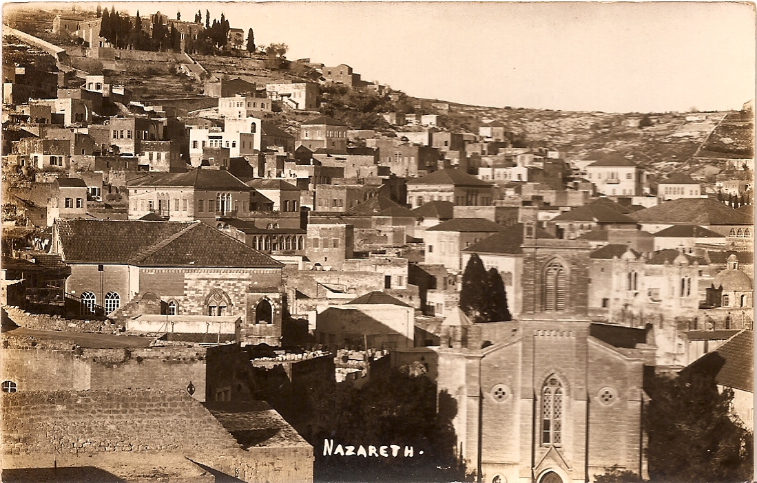 Nazareth